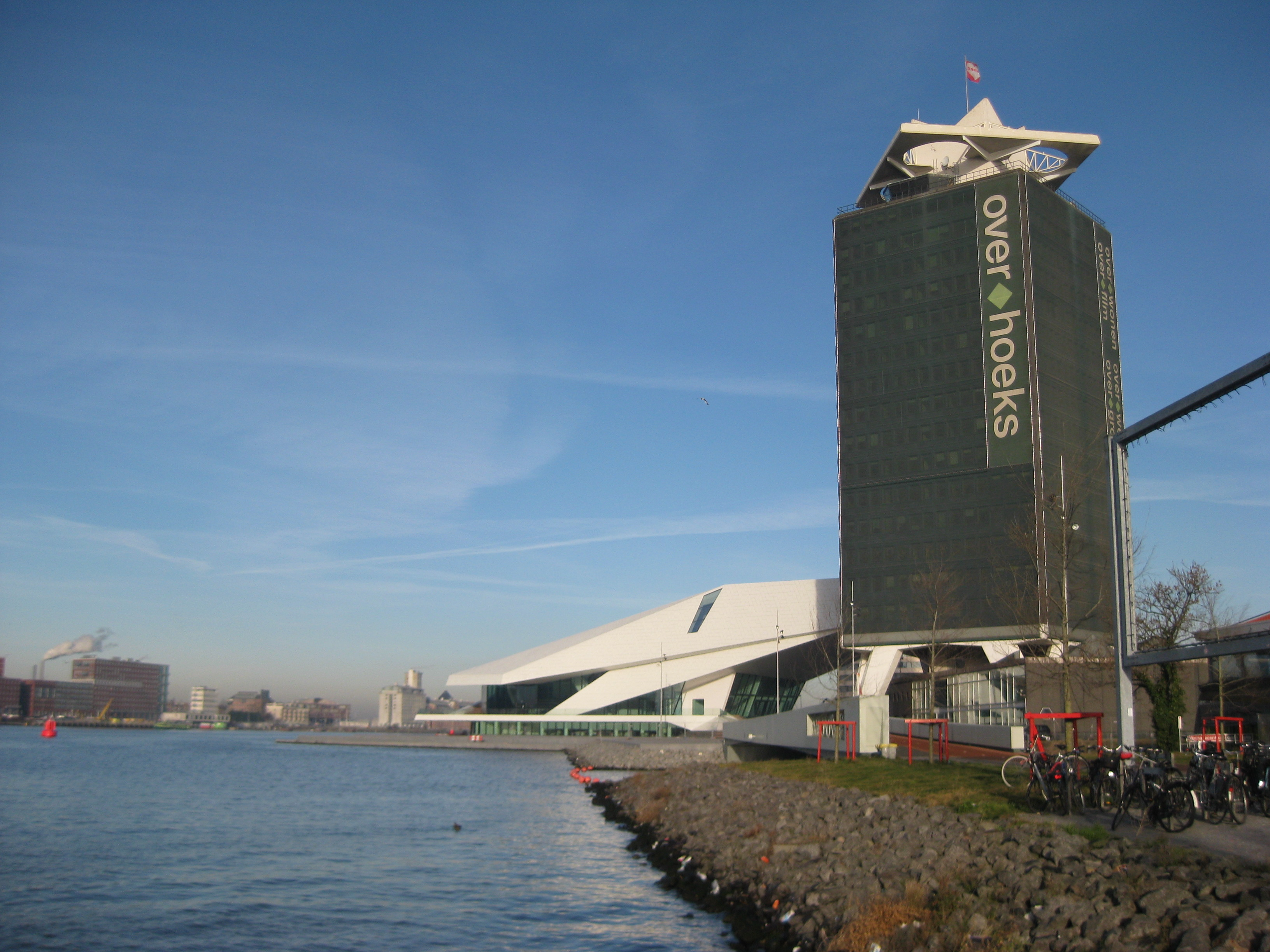 Voormalige Shell-toren in Amsterdam-Noord met rechts de Volewijckbrug